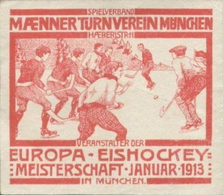 Плакат и логотип 1913 Ice Hockey European Championship.